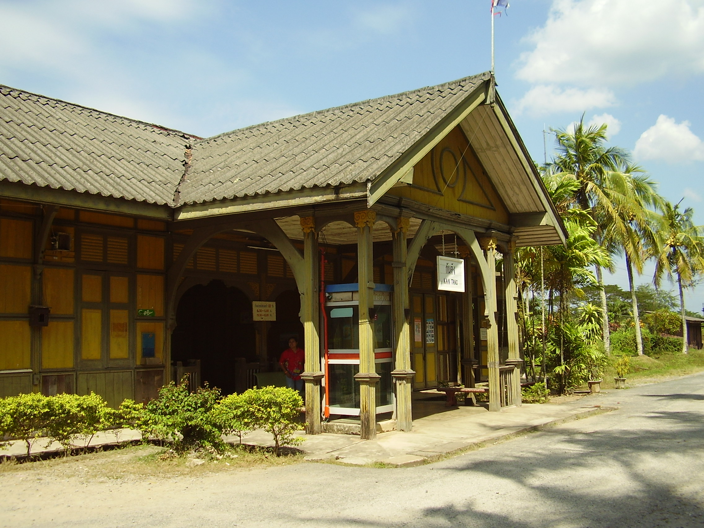 Kantang railway station